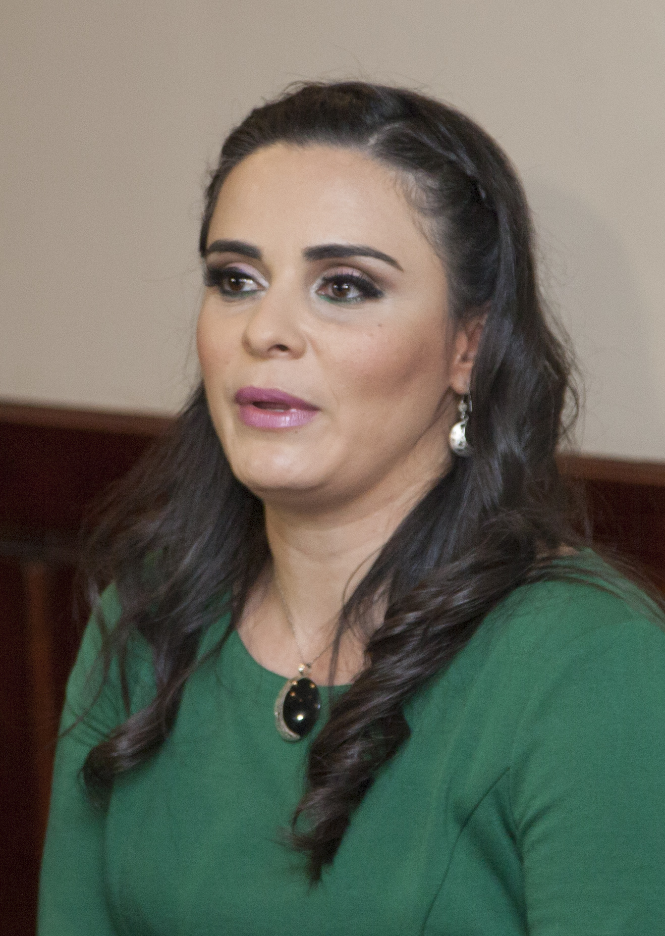 Ciudad de Guatemala, 18 ago 2014.- En la gráfica, Olinda Salguero, Directora Ejecuiva de la Fundación Esquipulas para la Integración Centroamericana. Foto: Nina Zambrano Díaz. Cancillería del Ecuador.